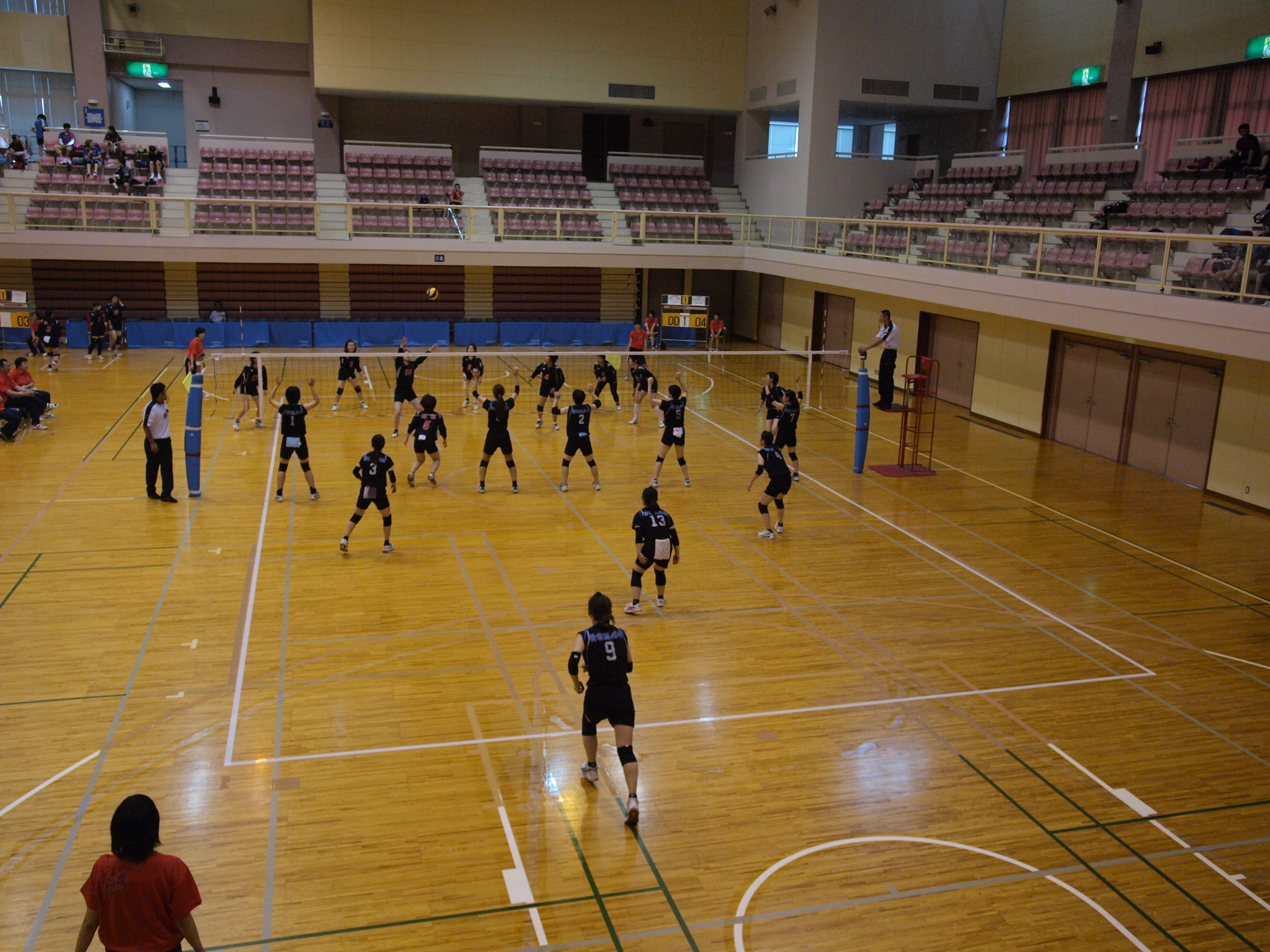 9人制バレーボール